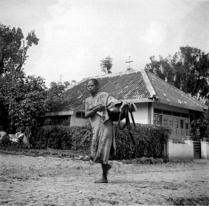 Negatief. Een vrouw met een waterkruik bij Saradan, Madiun, Oost-Java